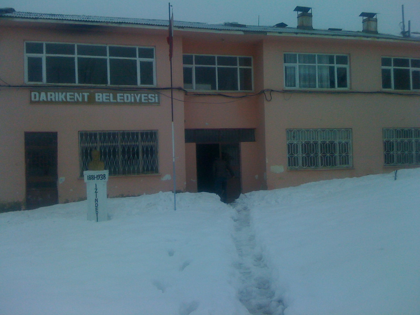 darıkent